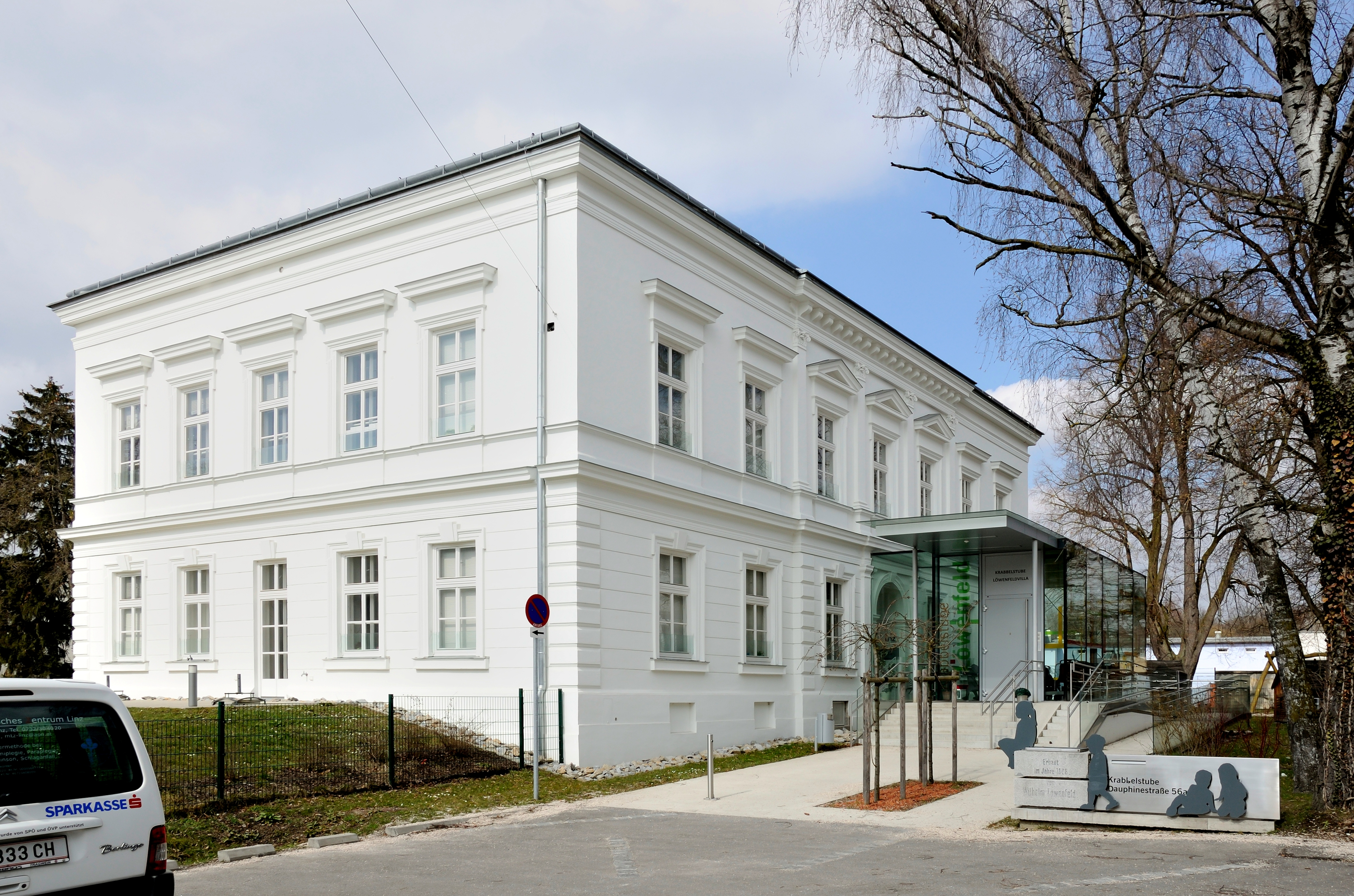 Kindergarten